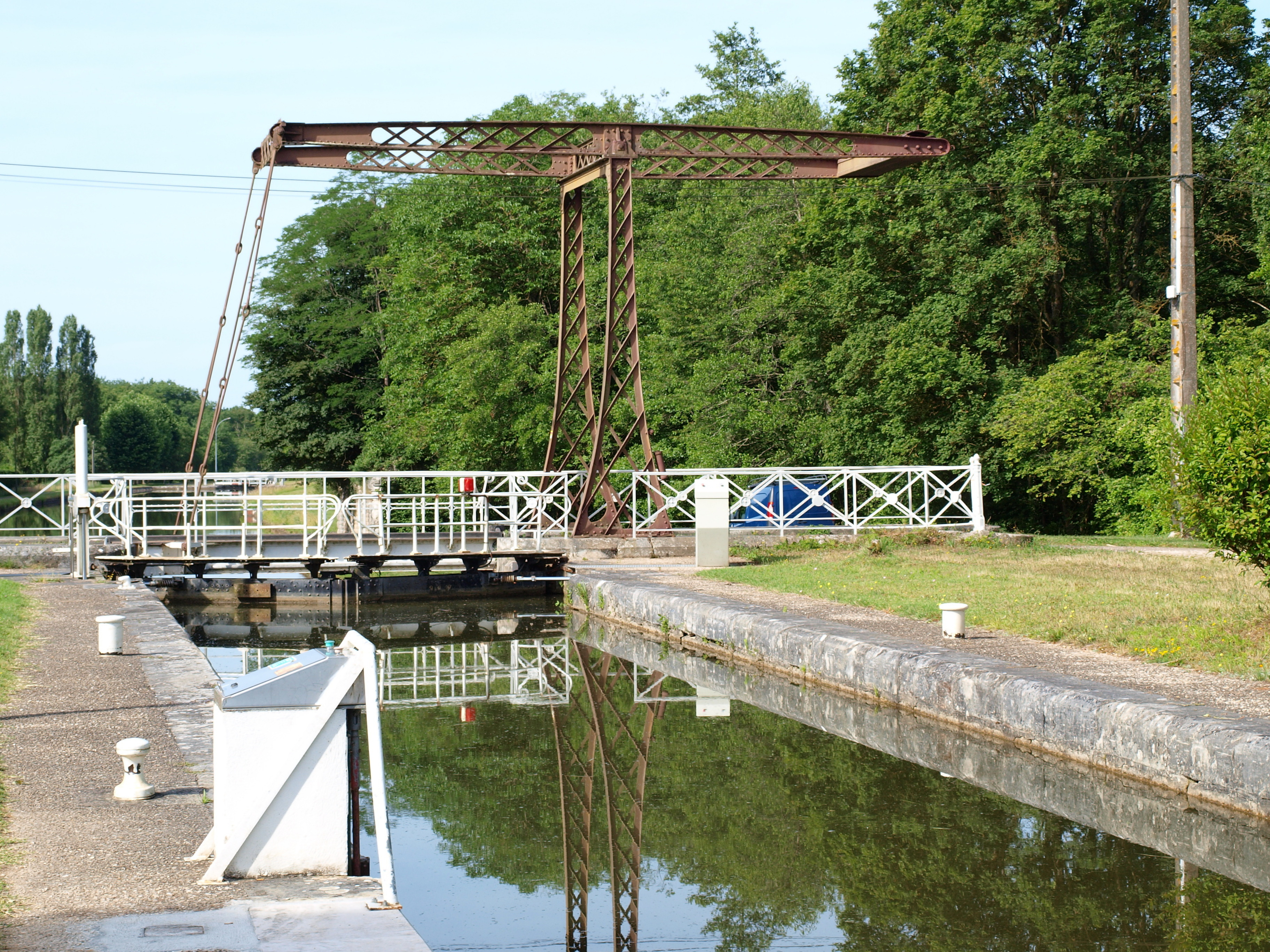 Ouzouer-sur-Trézée (Loiret, France). Canal de Briare : écluse n°11 du Petit Chaloy. Vue vers le sud-ouest. En arrière-plan on aperçoit une portion de l'écluse n° 10 de Notre-Dame.